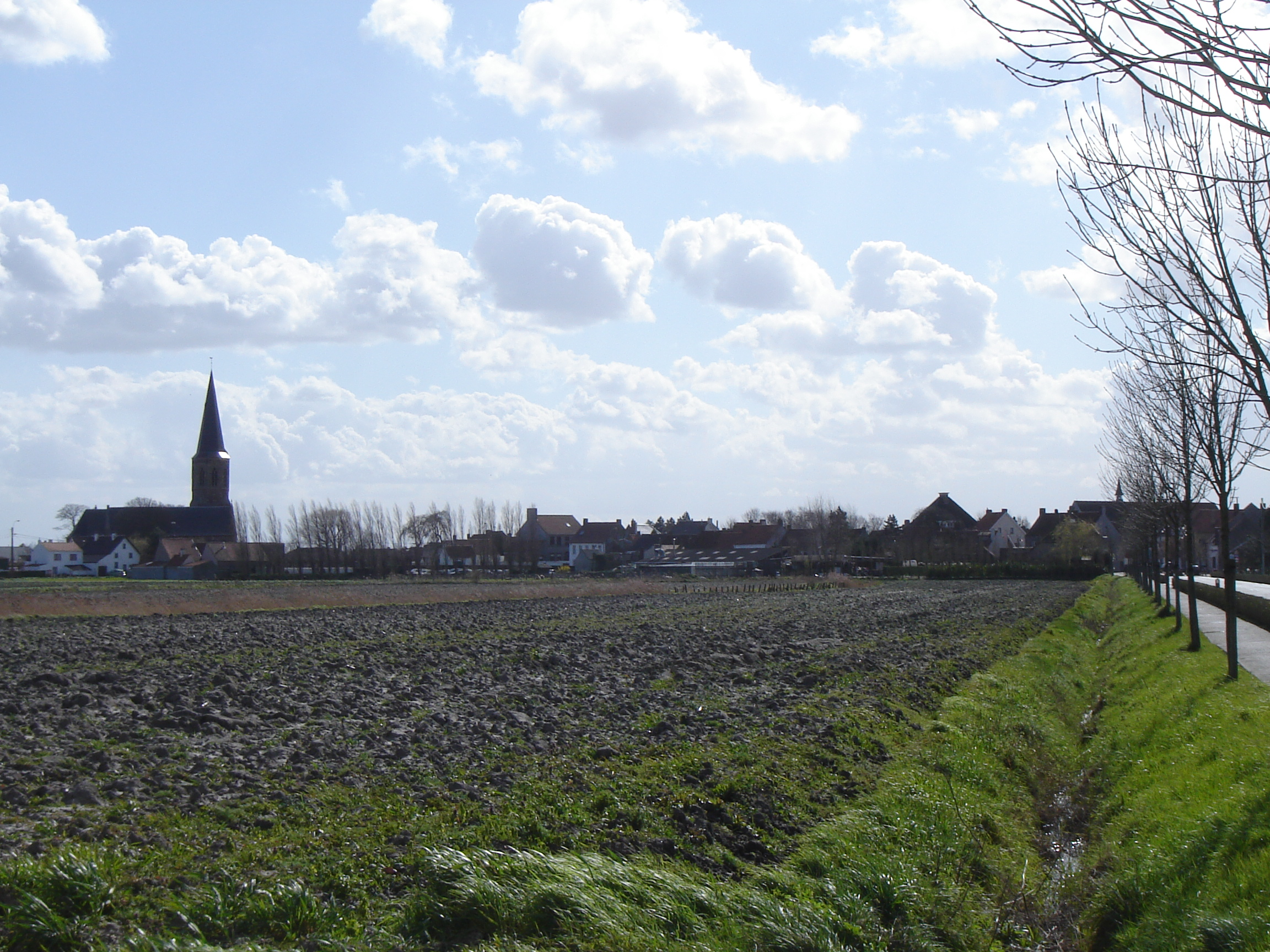 View on the village of Klemskerke, De Haan, West Flanders, Belgium, as seen from the road to De Haan Center